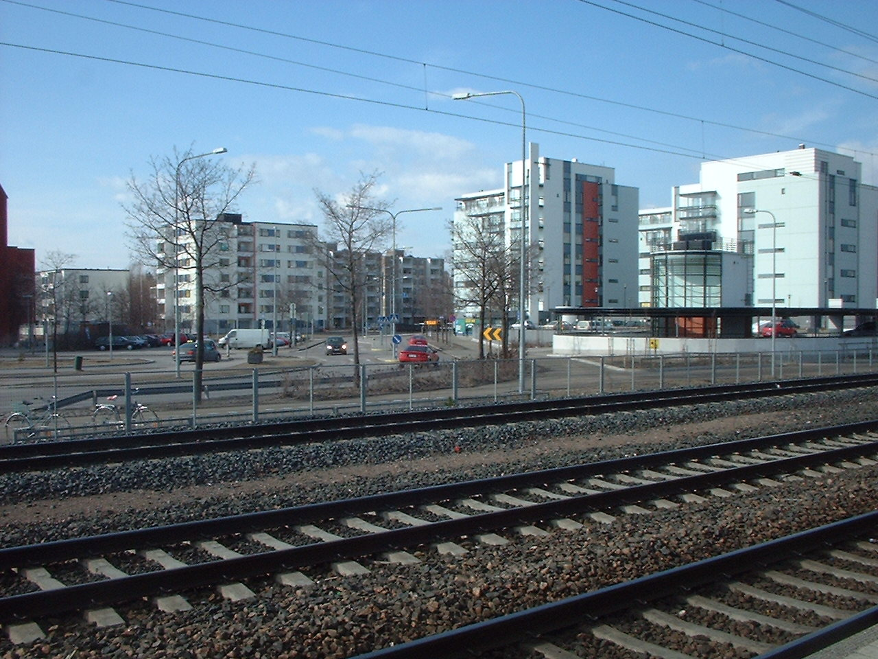 Puistolan asemanseudun kerrostaloja ja raiteita